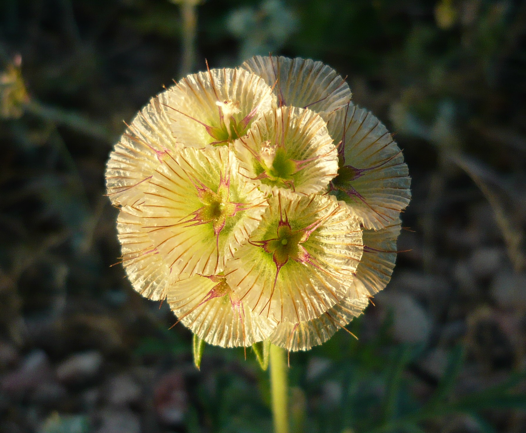 Scabiosa stellata, frutos. Olivares de Júcar, Cuenca, España.